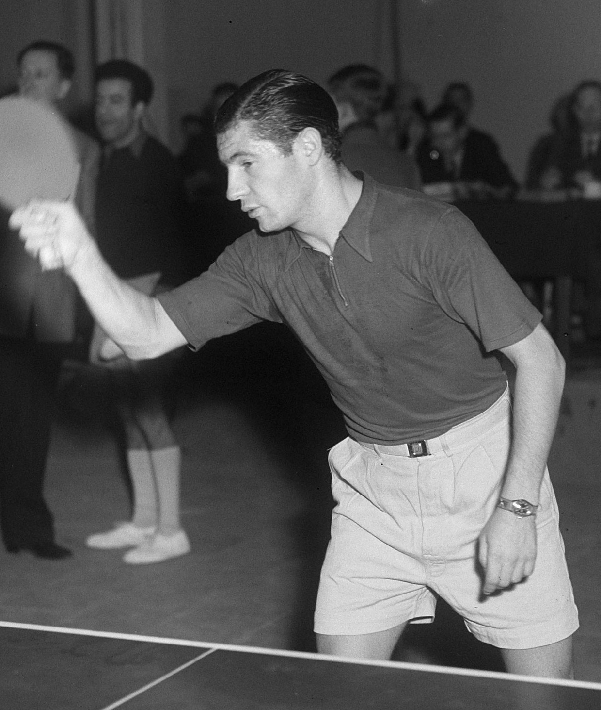 Internationaal tafeltennis te Utrecht, Richard Bergmann (Engeland) [oorspronkelijk afkomstig uit Oostenrijk. Veelvuldig wereldkampioen, red.]